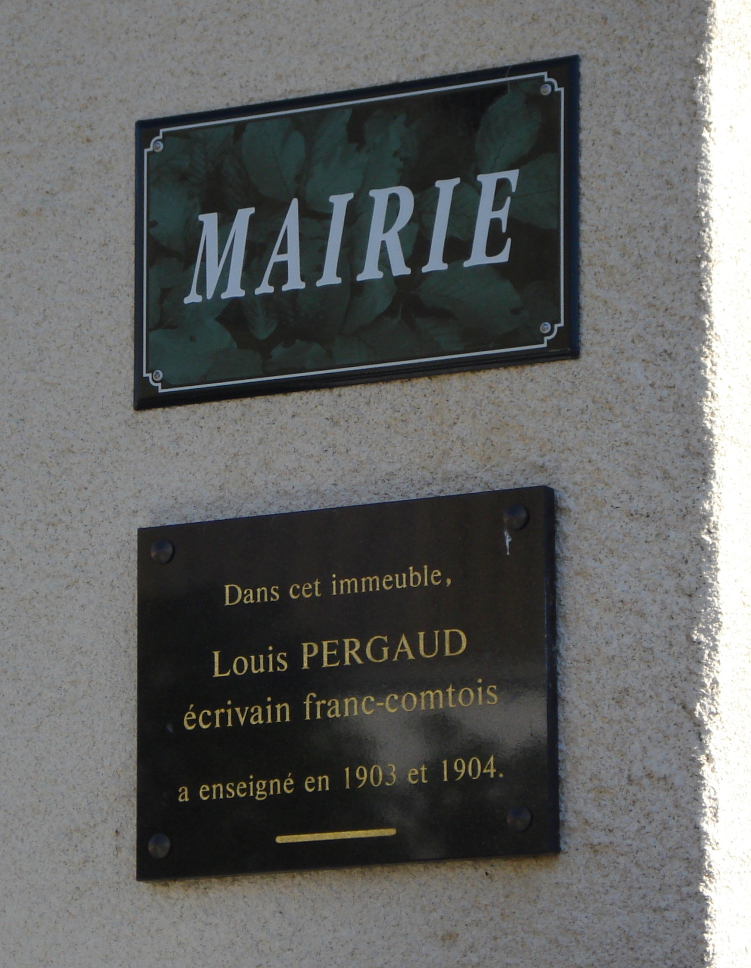 Plaques se trouvant sur la mairie de la commune de Durnes, France. La plaque du dessous fait mention du passage de l'écrivain Louis Pergaud en tant qu'enseignant dans la commune.